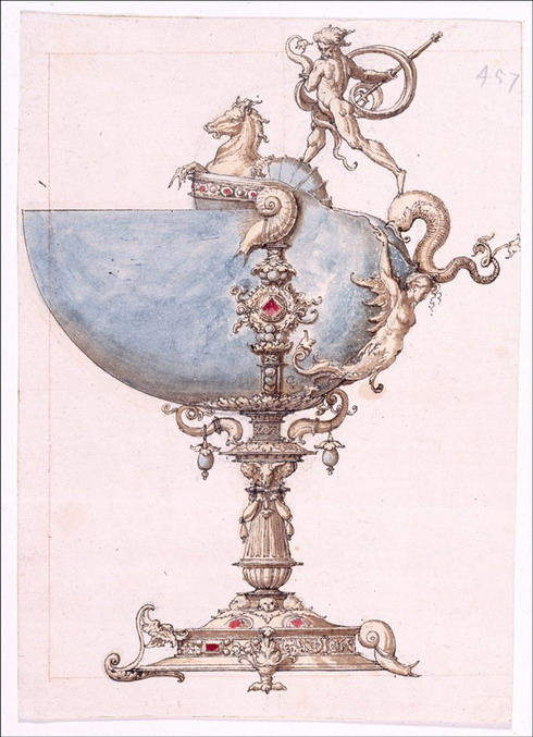 Проект ювелірного виробу з мушлею наутилуса роботи Пітера Кука ван Альста